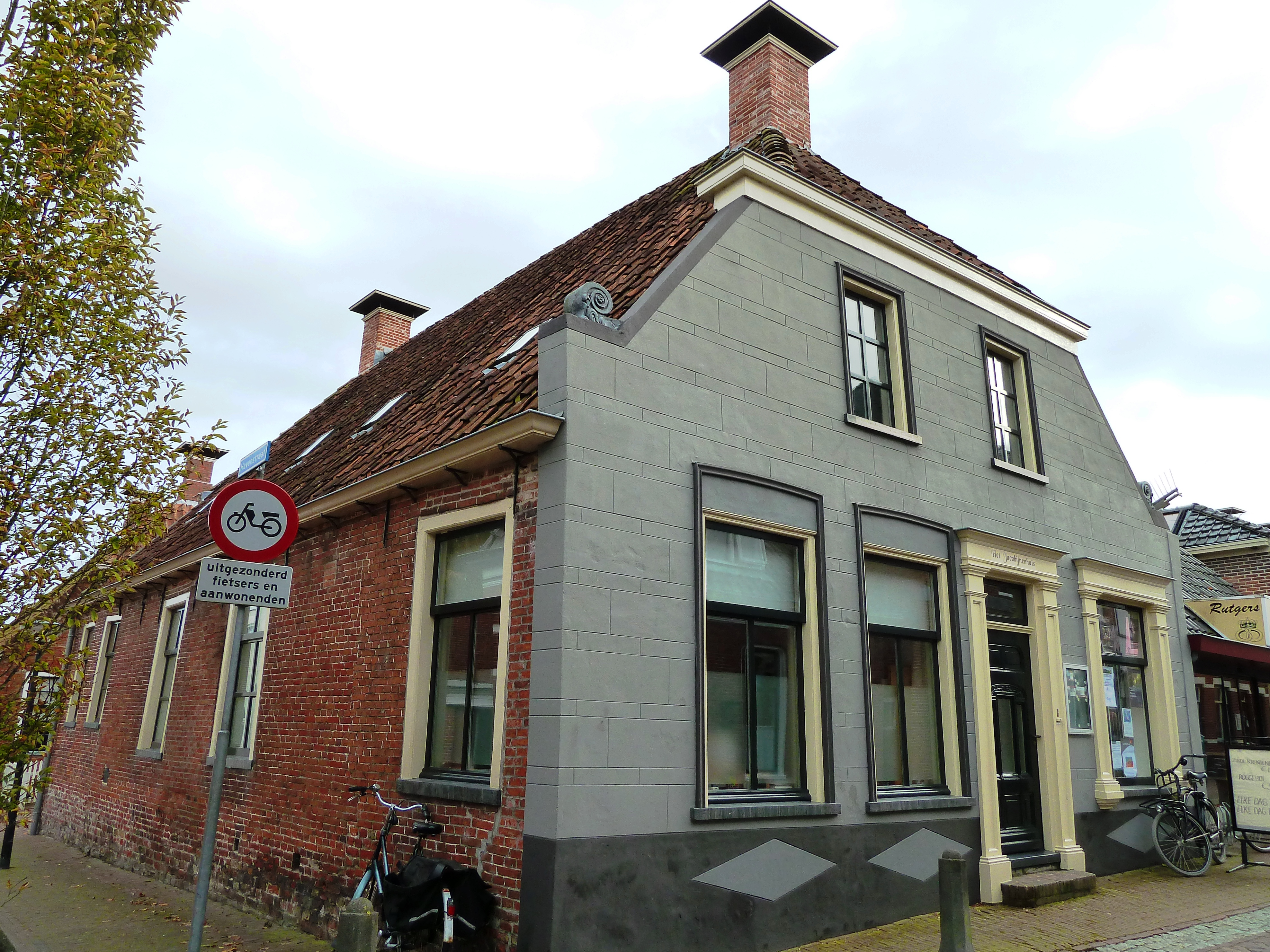 Hoofdstraat Winsum 27/Havenstraat 2 in het Groningse dorp Winsum. Op de gevel prijkt de naam 'Jacobijnenhuis' (mogelijk sinds de verbouwing in 2002). Bevat 6 voormalige vensters uit de 13e of 14e eeuw. Mogelijk onderdeel geweest van het Jacobijner klooster van Winsum, waarvan de ligging tot op heden onbekend is. Tot in de 2e helft van de 20e eeuw was er een bakkerij gevestigd.